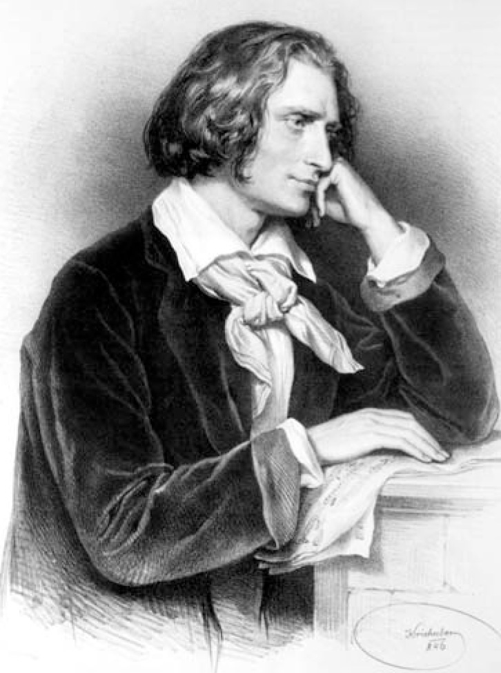 Franz Liszt, lithograph by Josef Kriehuber, 1846